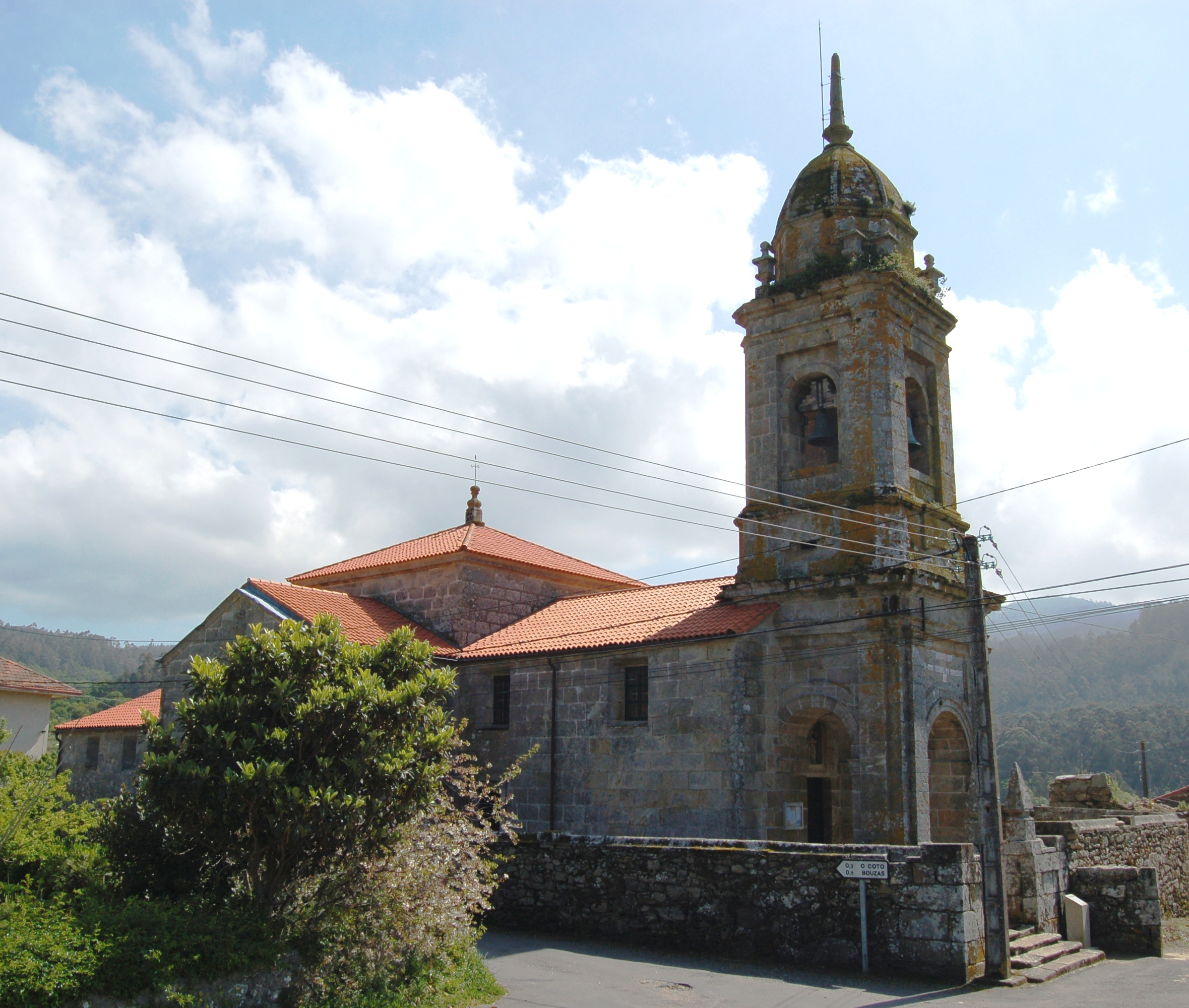 Igrexa parroquial de Miñortos (Porto do Son).